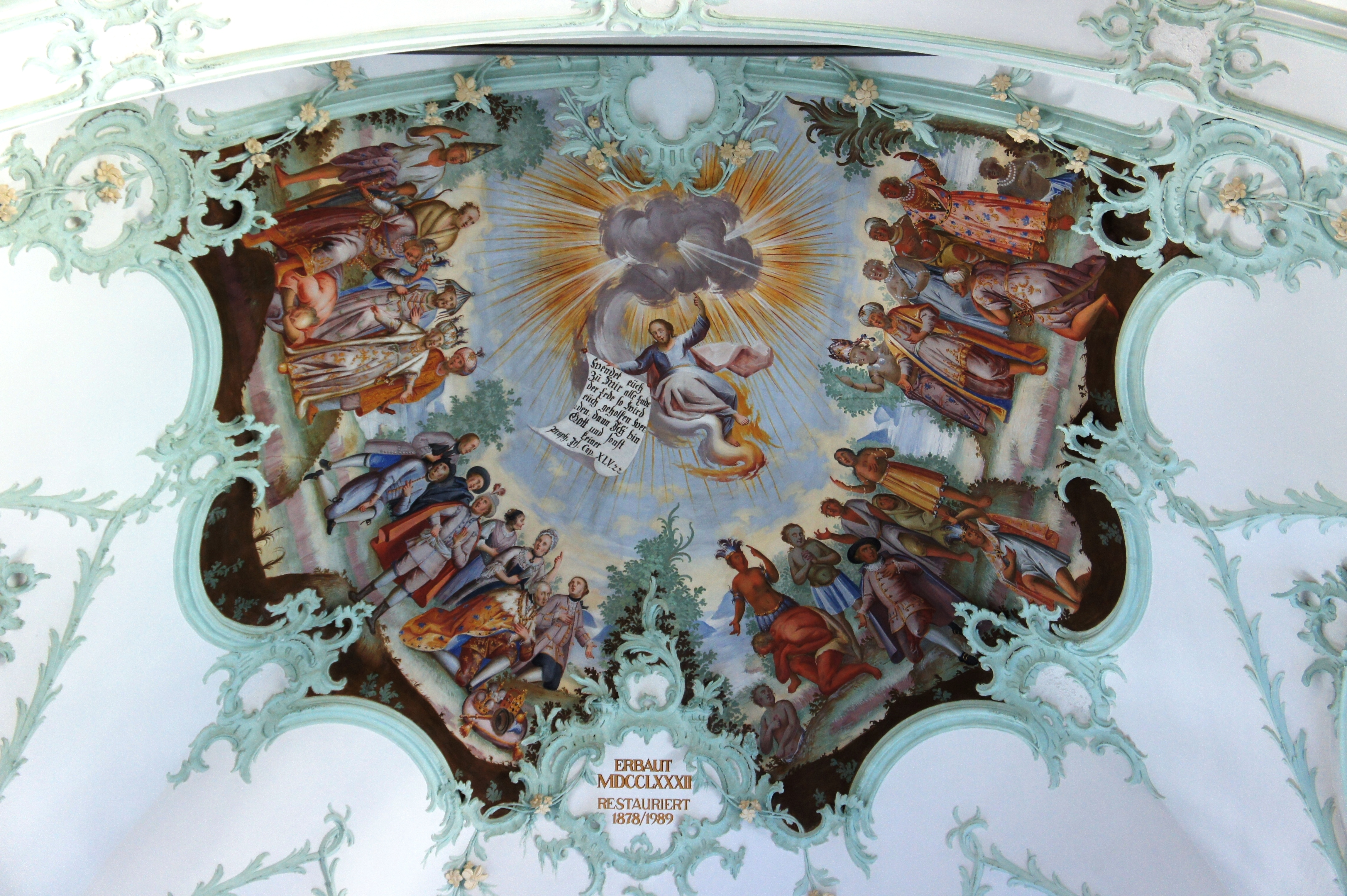 Deckengemälde im Chorbogen der ref. Kirche Trogen: Allegorie der vier Erdteile